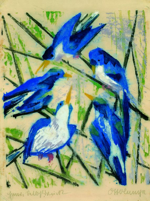 Otto Lange, Farbholzschnitt, Blaue Vögel, 1916.